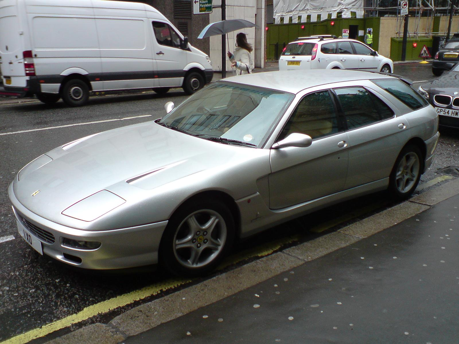 Ferrari 456E (Estate)